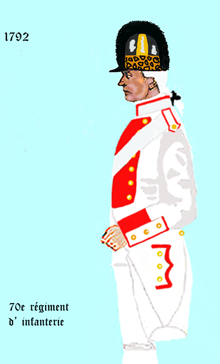 Uniform eines königlich französischen Infanterie-Regiments gemäß Dekret von 1792. - Entnommen und überarbeitet aus: „LES UNIFORMES ET LES DRAPEAUX DE L'ARMÉE DU ROI“ Marseille 1899.